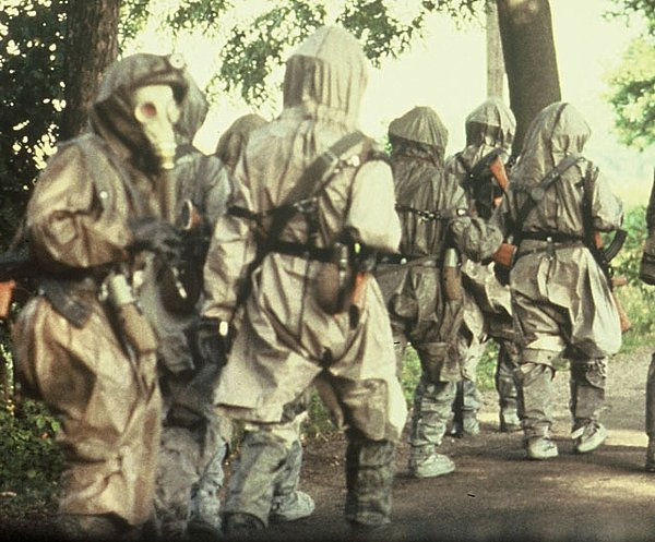 Soldaten der NVA beim Marsch unter Vollschutz.